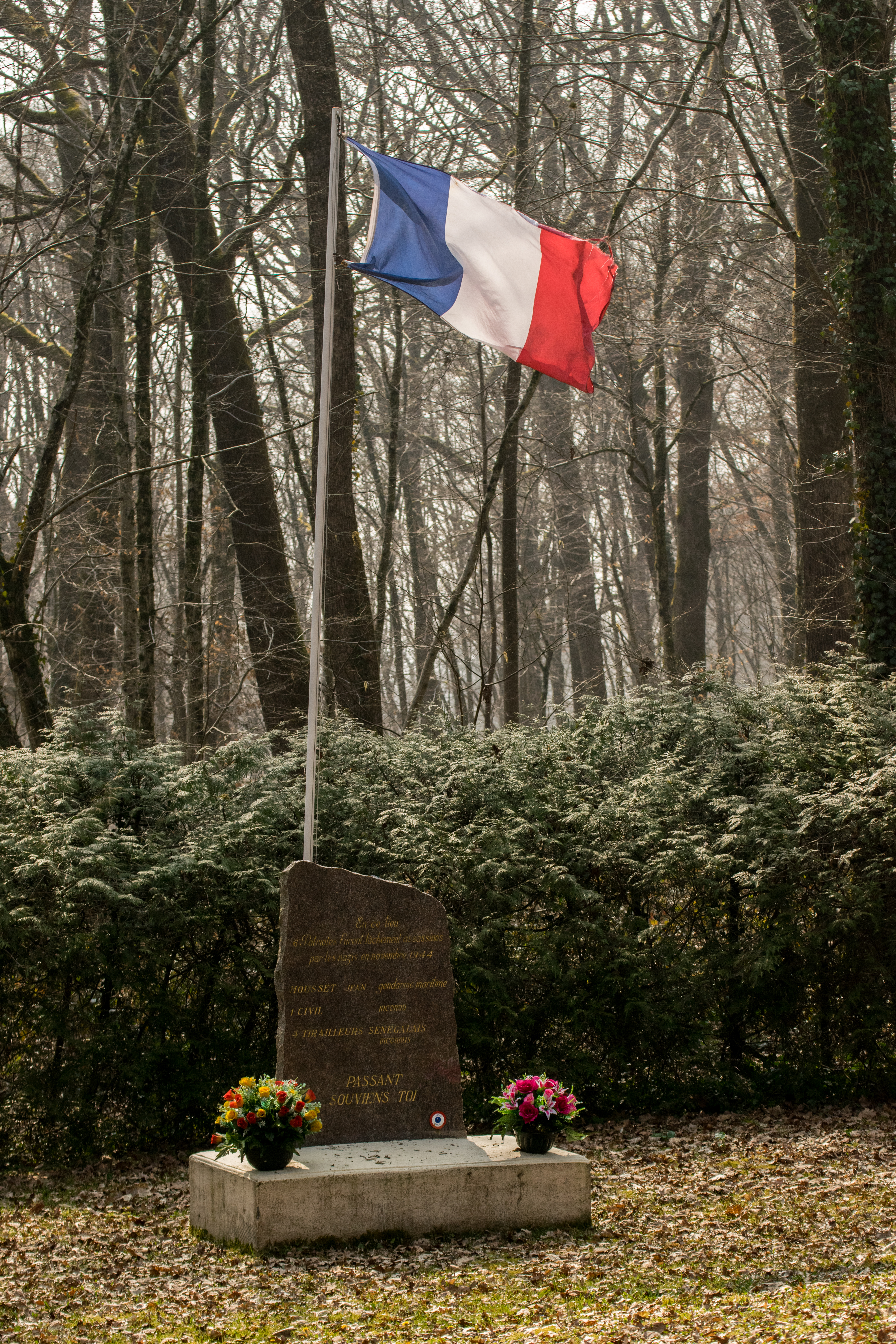 « Stèle des fusillés » à Sevenans, France